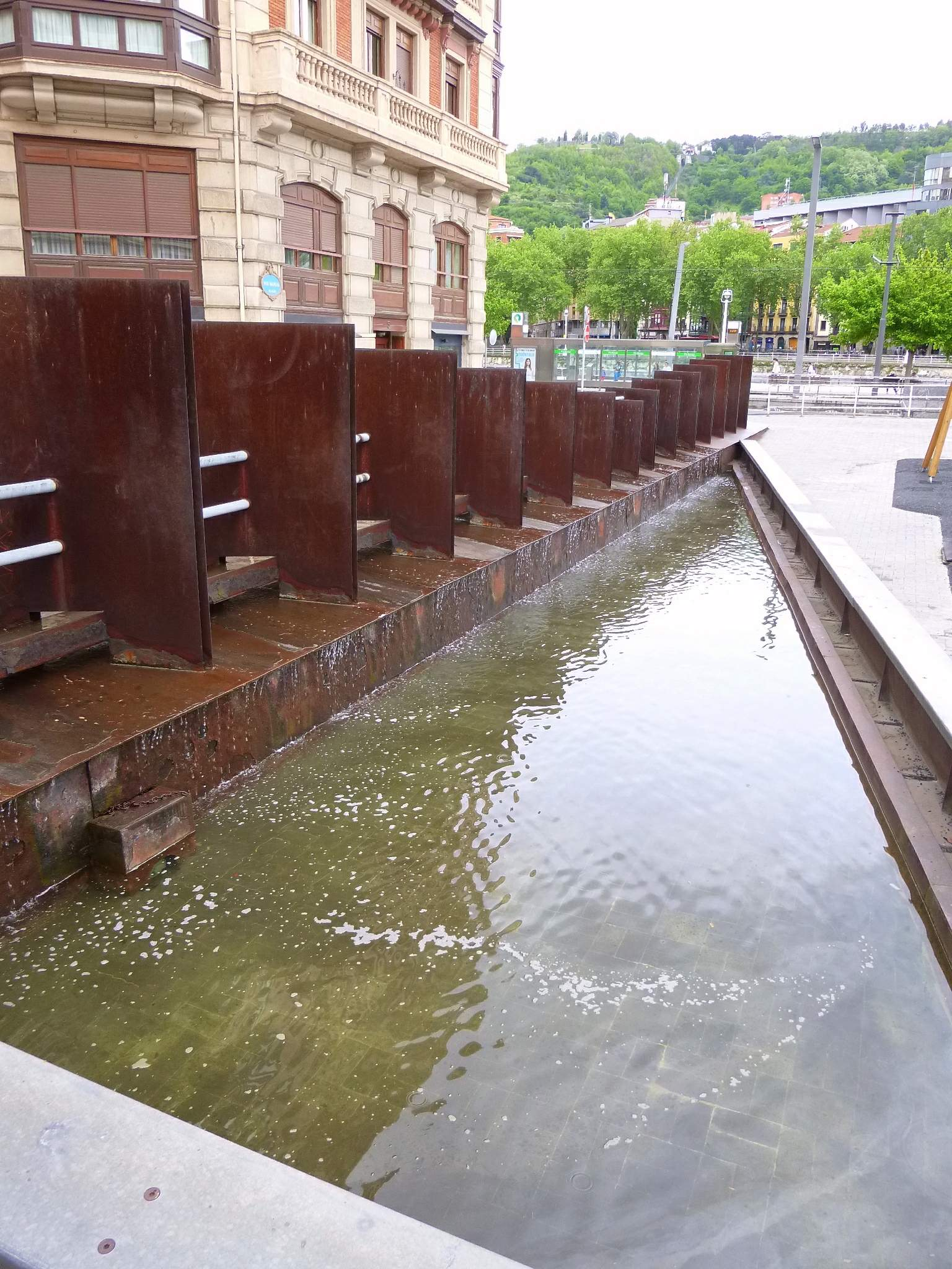 Plaza Pío Baroja (Bilbao)